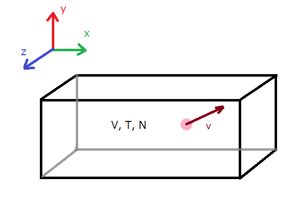 Цей малюнок демонструє ідеальний газ об'ємом V та абсолютною температурою T, який містить N молекул, кожна з яких рухається із середньою швидкістю v.